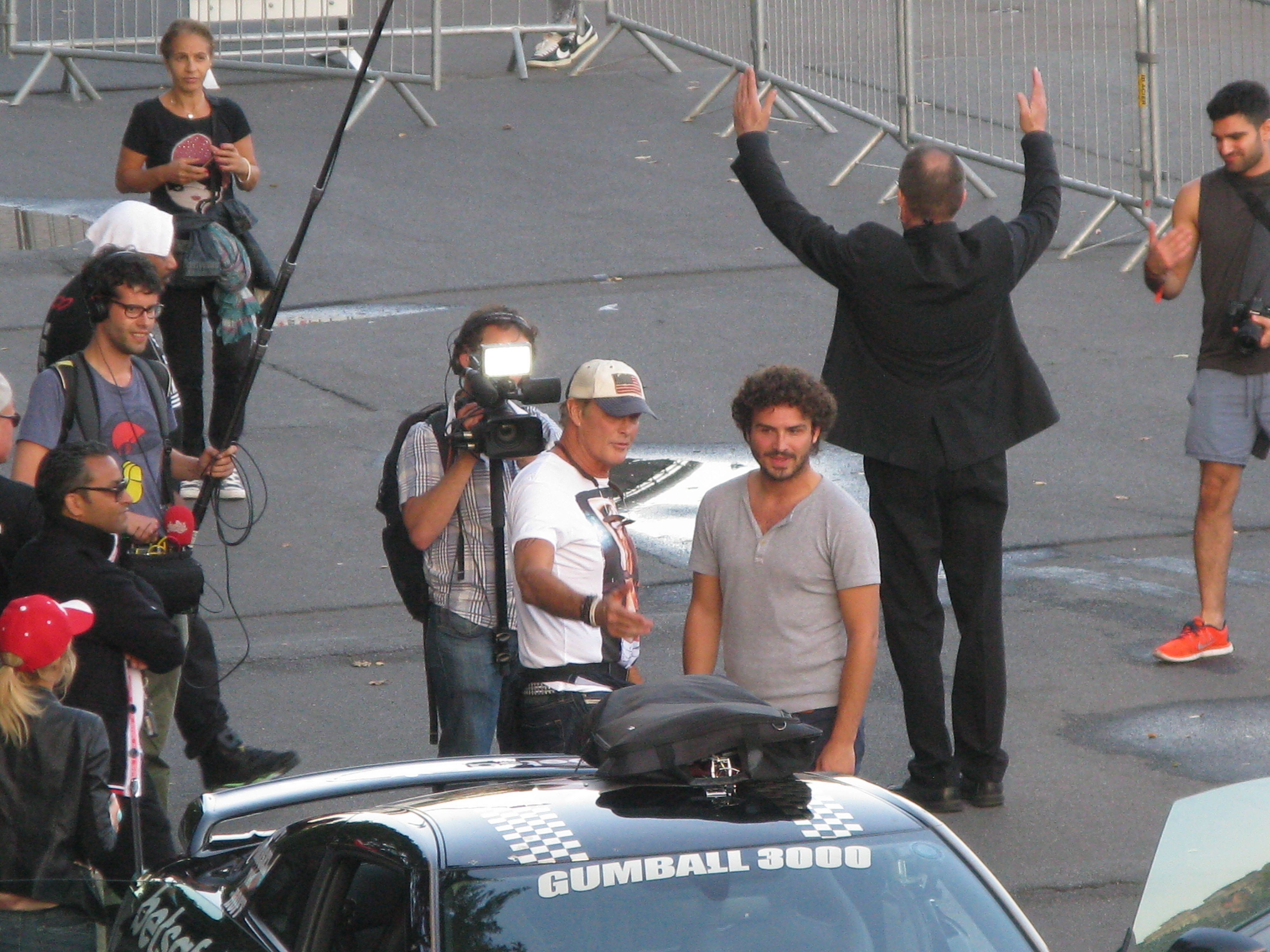 L'acteur David Hasselhoff et le présentateur Maxime Musqua lors du Gumball 3000 à Paris.